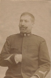 Joaquim da Graça Correia e Lança, 1898 com farda de capitão de infantaria do Exército do Ultramar